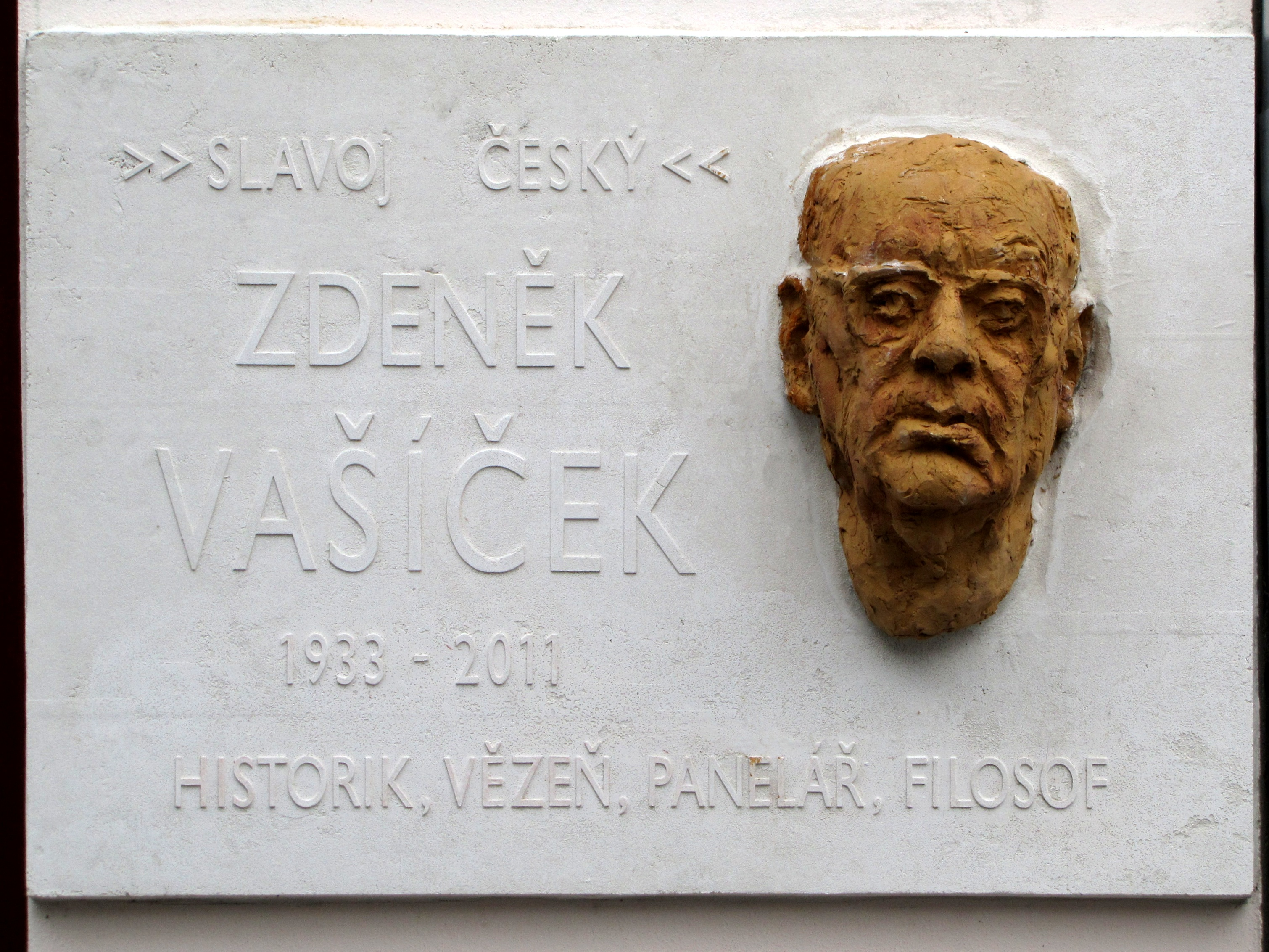 Pamětní deska Zdeňka Vašíčka na domě jeho rodičů v Kyjově, Masarykovo náměstí 37. Text: "Slavoj Český" Zdeněk Vašíček, 1933-2011, historik, vězeň, panelář, filosof